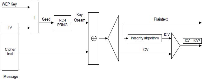 Монгол: aaa